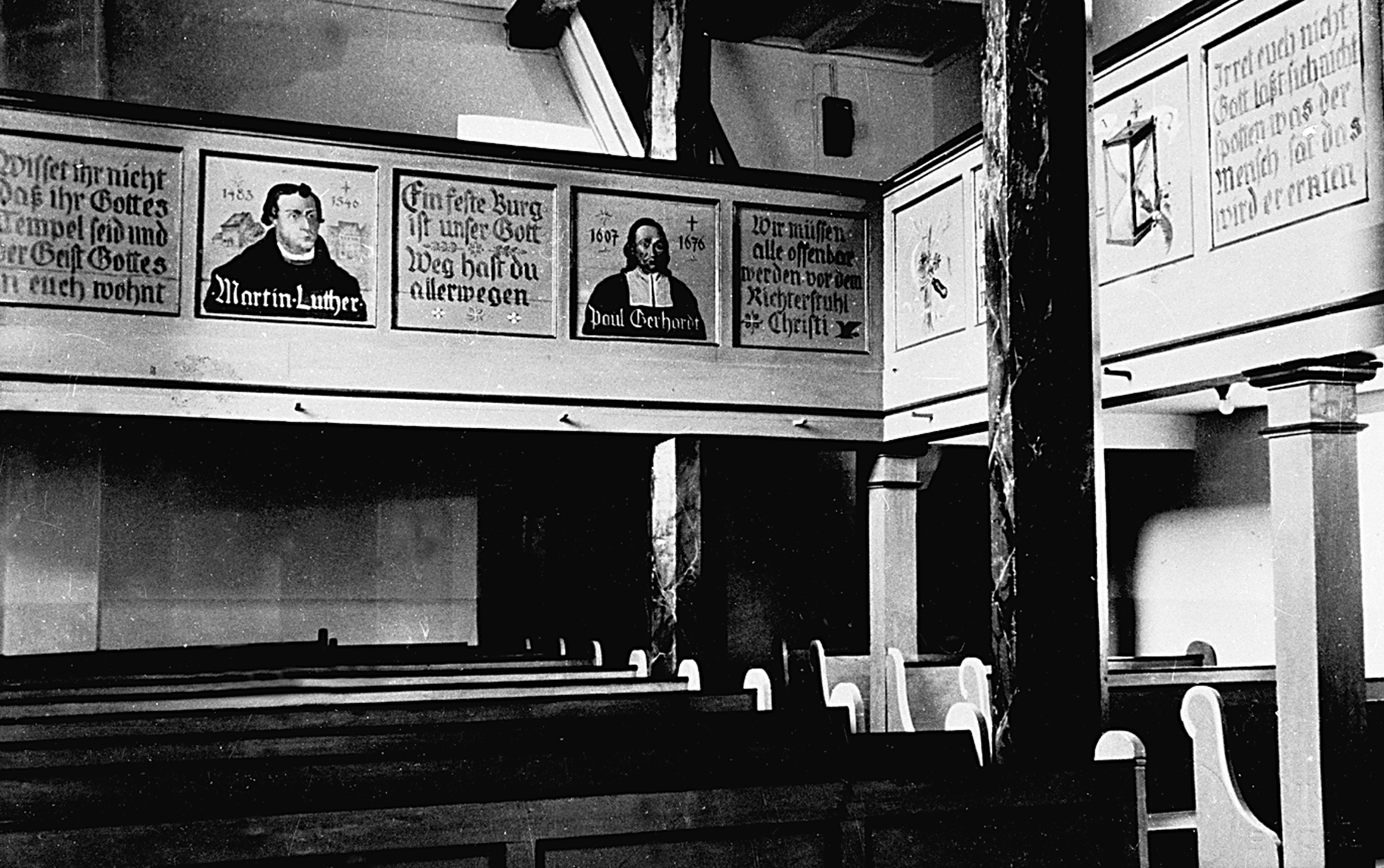 Evangelische Kirche Queckborn, Grünberg, Landkreis Gießen, Hessen, Deutschland